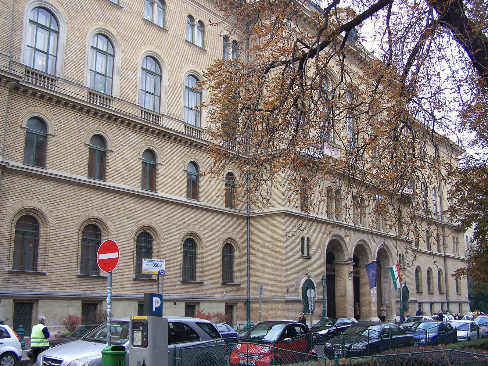 Fővárosi Bíróság épülete (Budapest 5, Markó Károly utca 27.) This is a photo of a monument in Hungary, Identifier: 11361